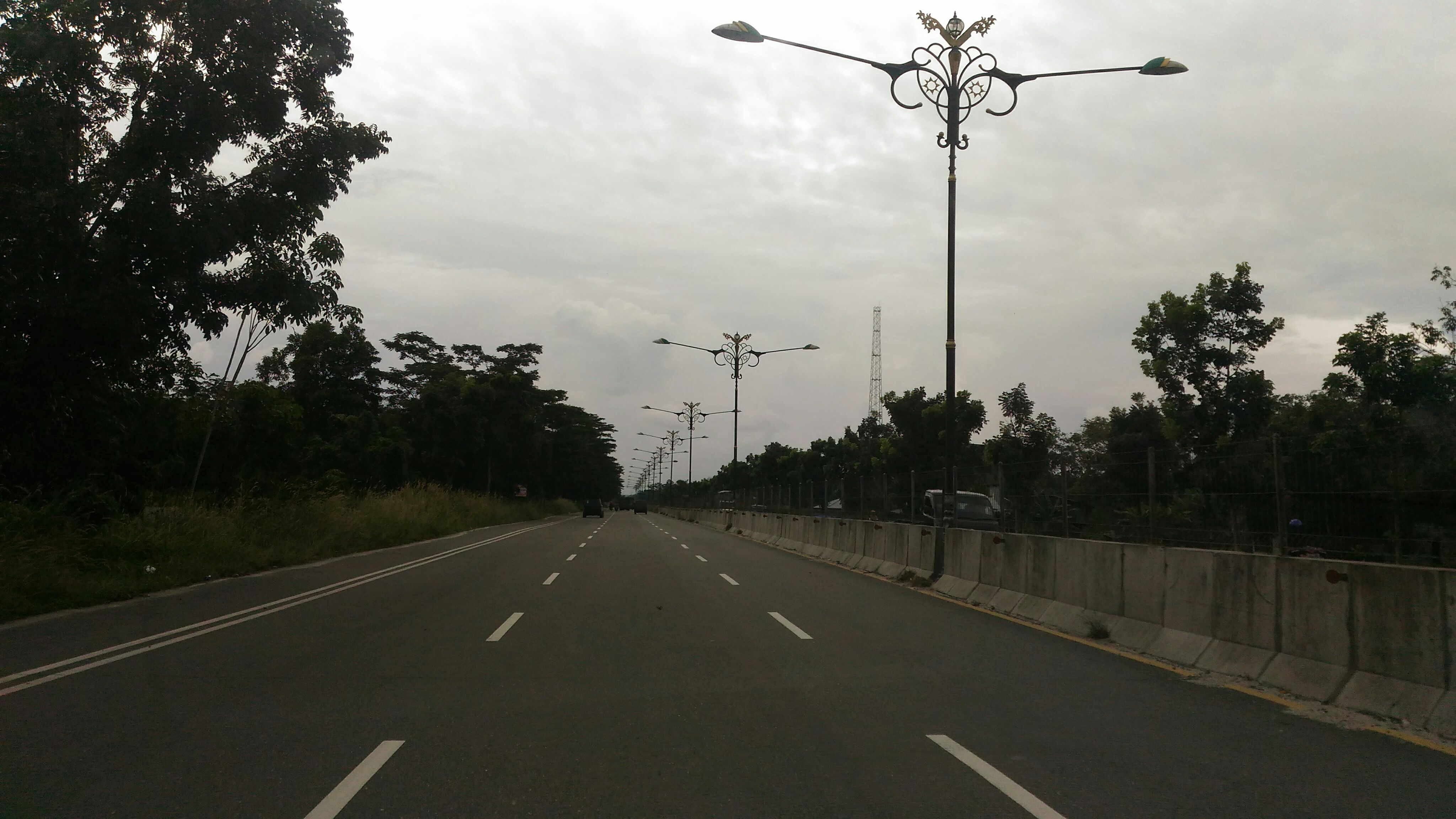 Bangkinang Pekanbaru Main Road